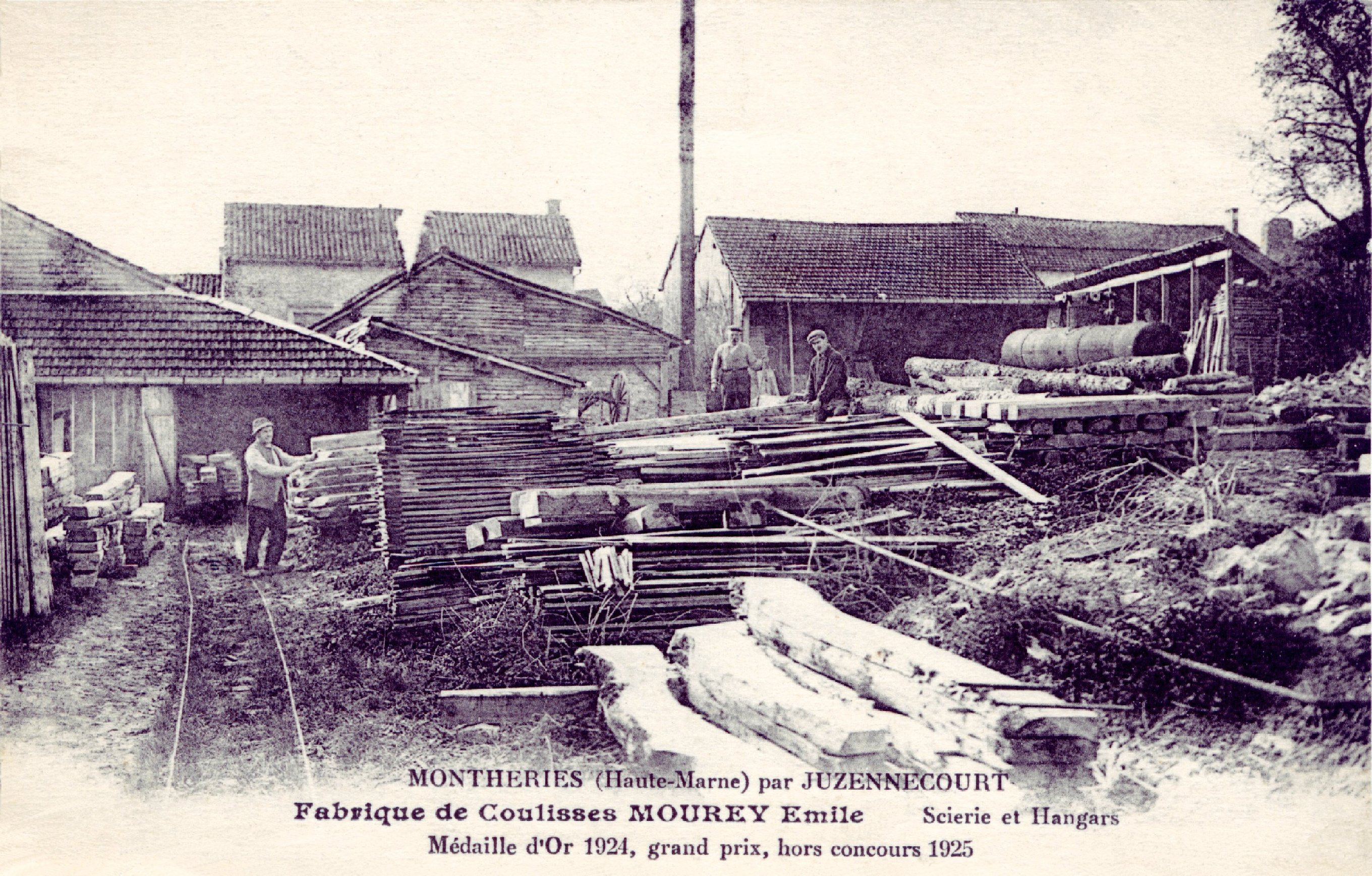 Etablissement artisanal de travail du bois